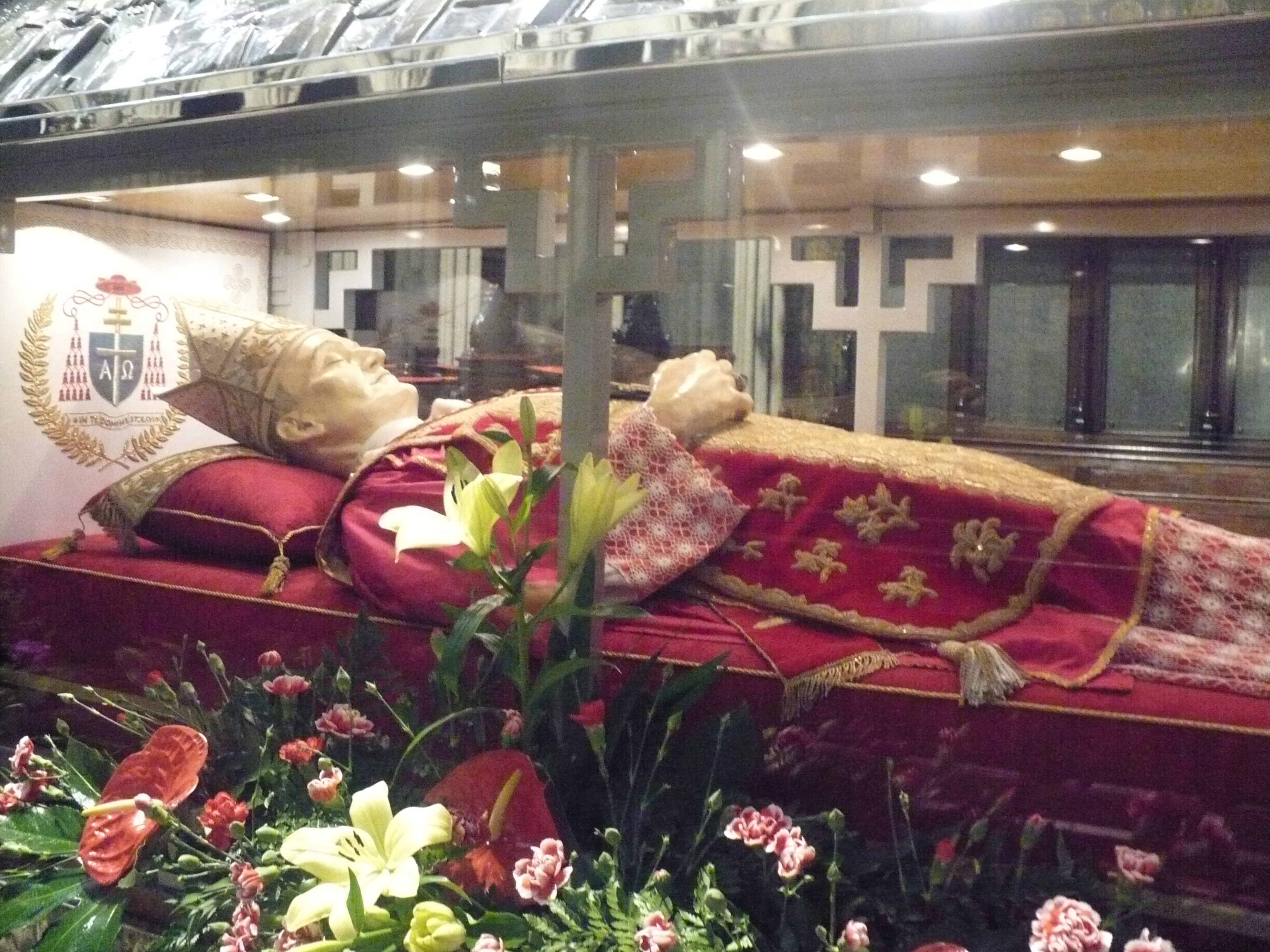 Zagreb, Hırvatistan